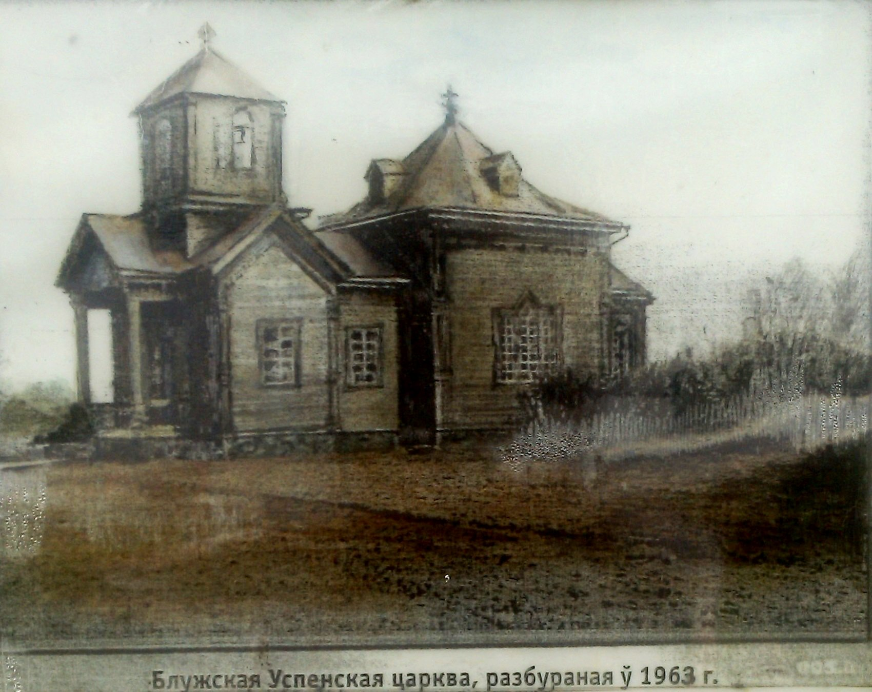 Успенская царква ў Блужы на здымку да 1962 г.